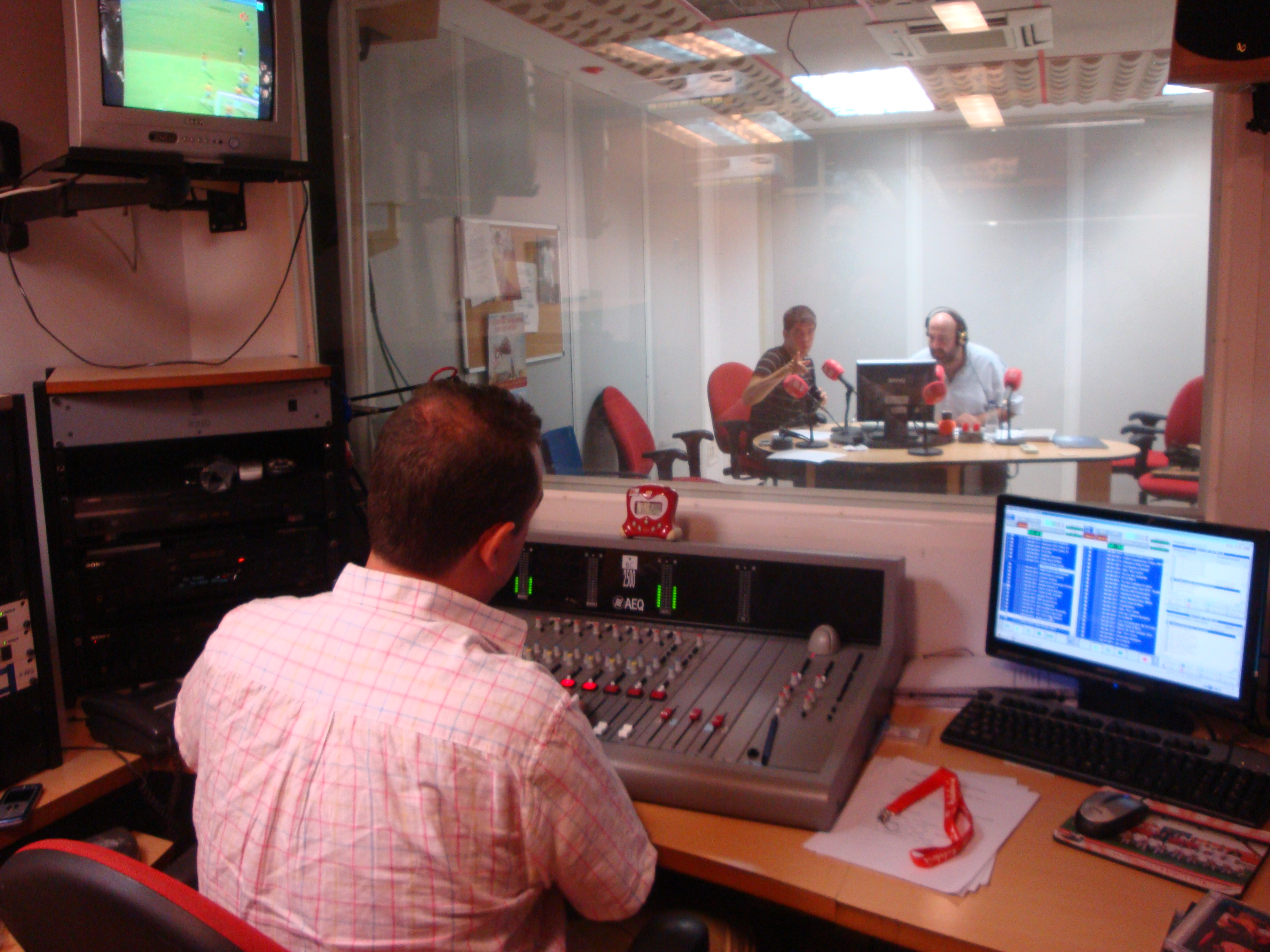 Estdios de Radio Sevilla FC